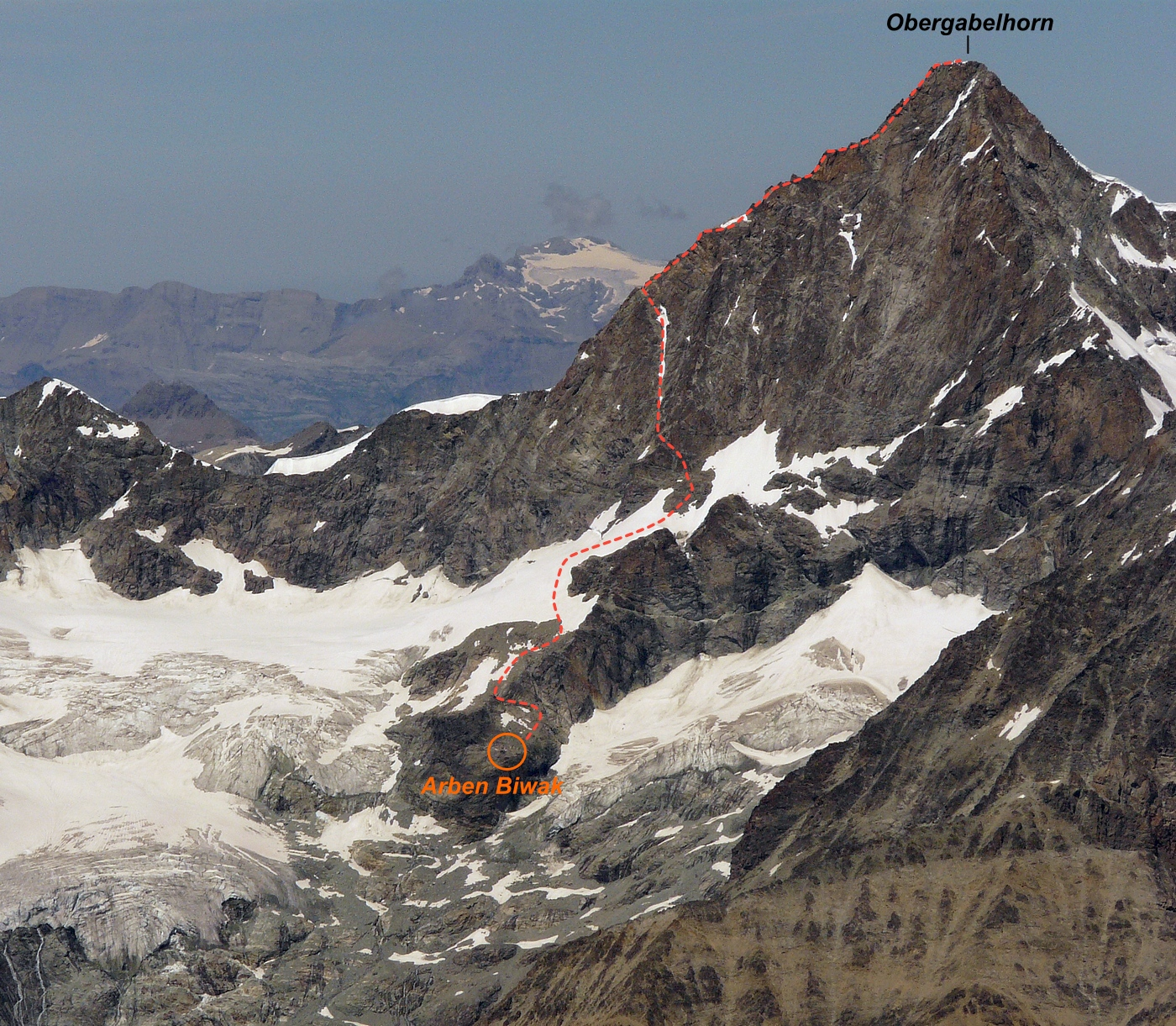 La salita dell'Obergabelhorn attraverso l'Arbengrat con indicazioni di percorso